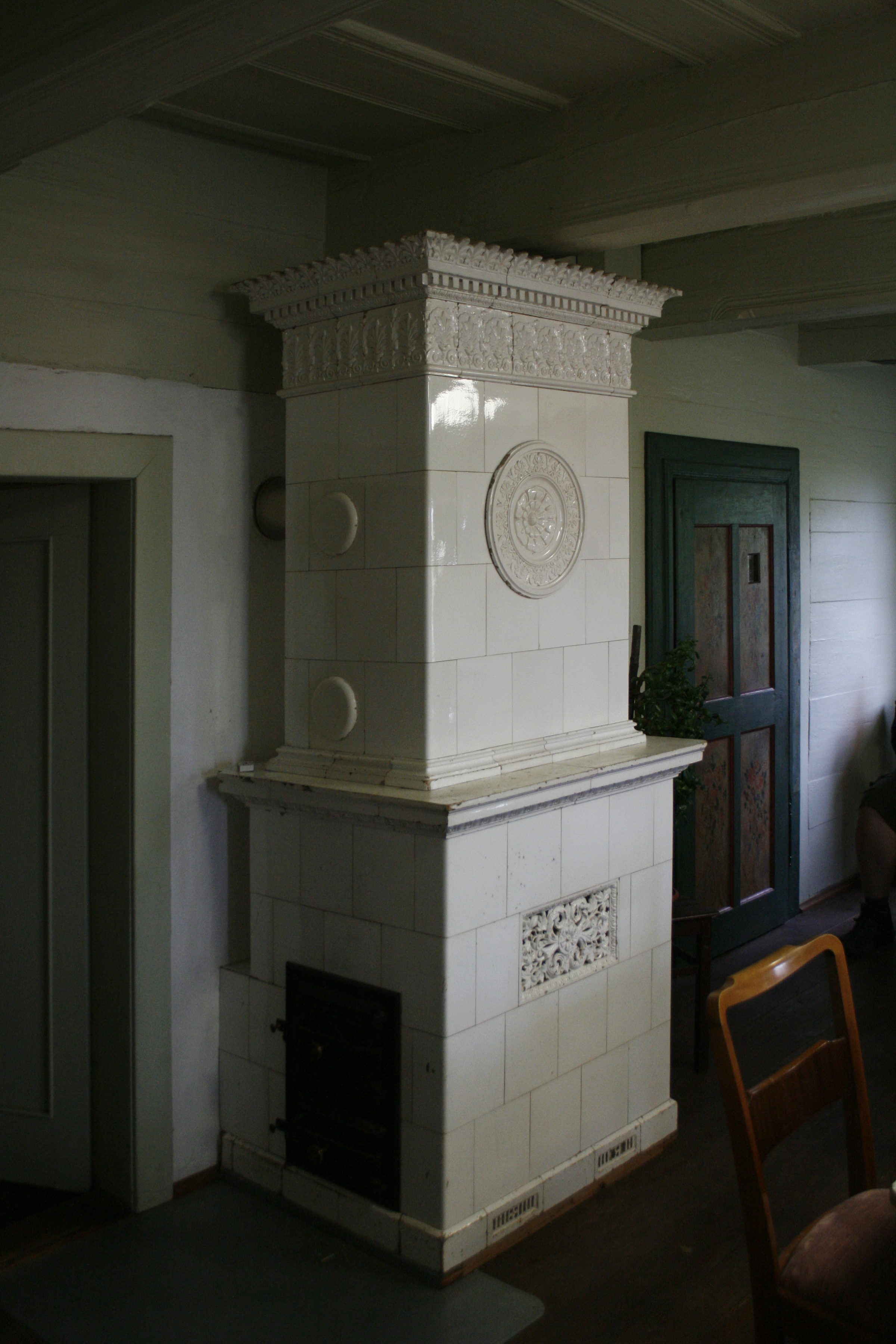 Seifhennersdorf - Rumburger Straße 46A